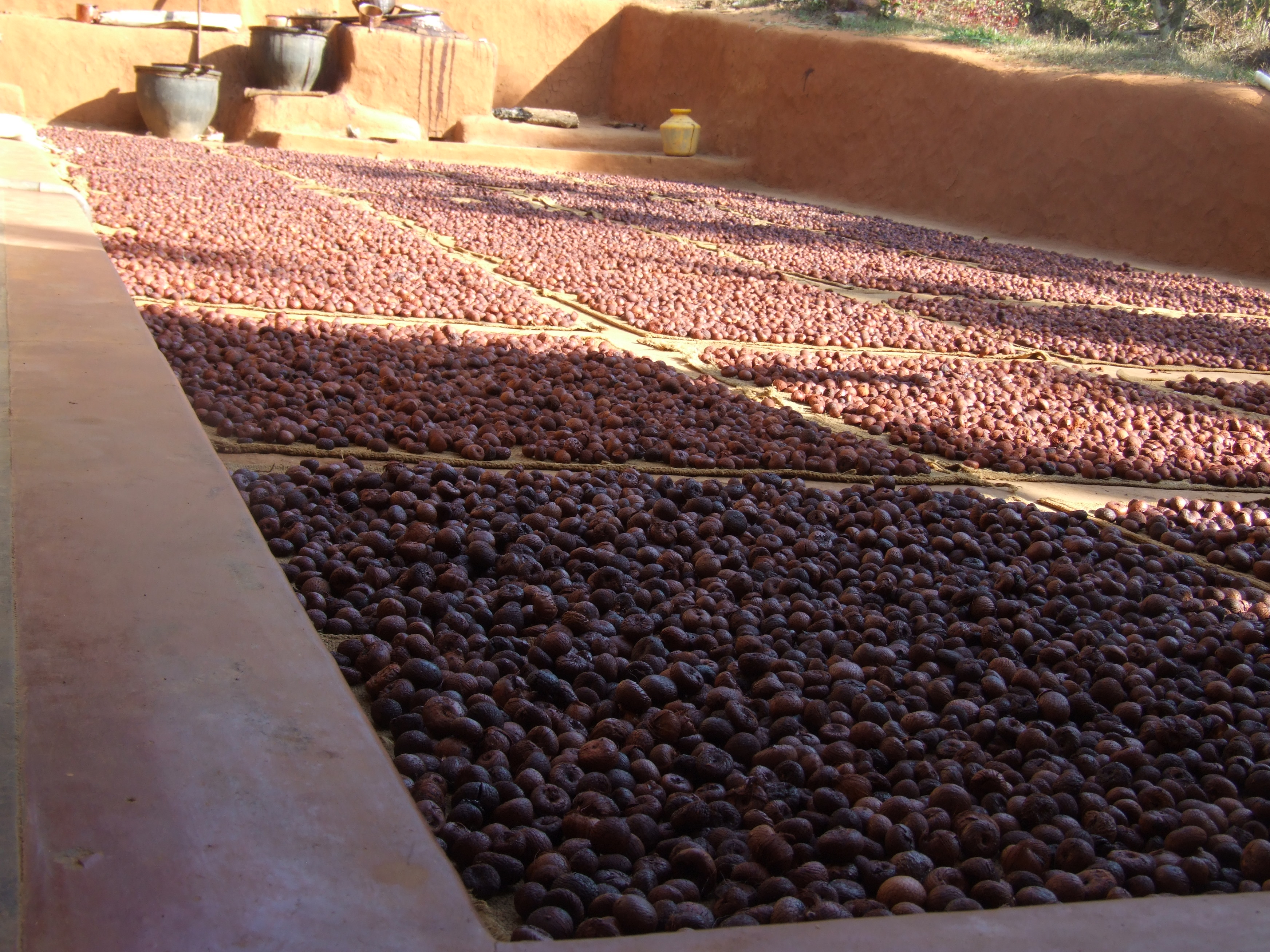 ಕನ್ನಡ: ಬೇಯಿಸಿದ ಅಡಿಕೆ